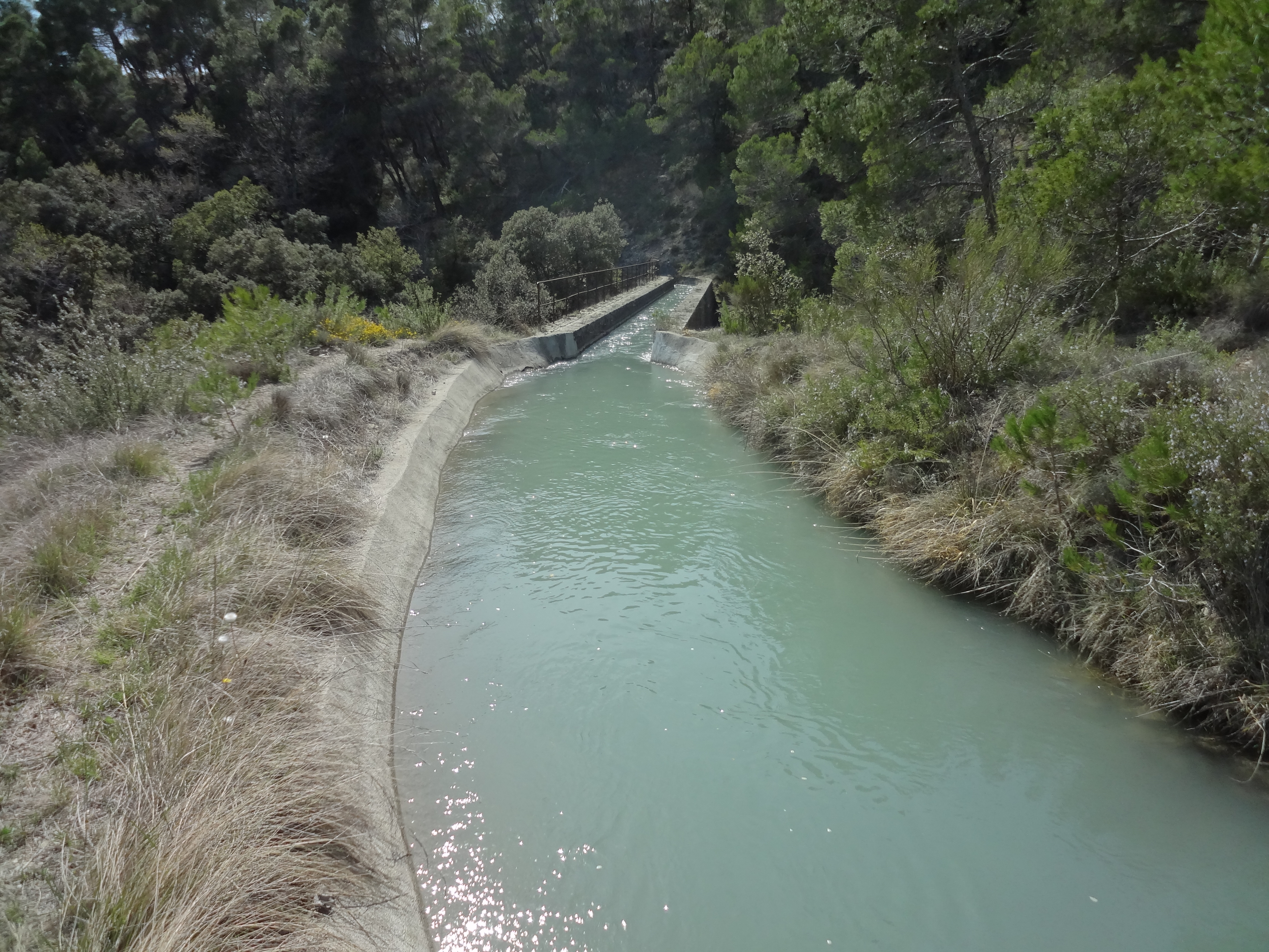 Canal d’irrigation, alimenté par la Durance, à Ganagobie, au-dessus du ravin immédiatement au nord du Buès